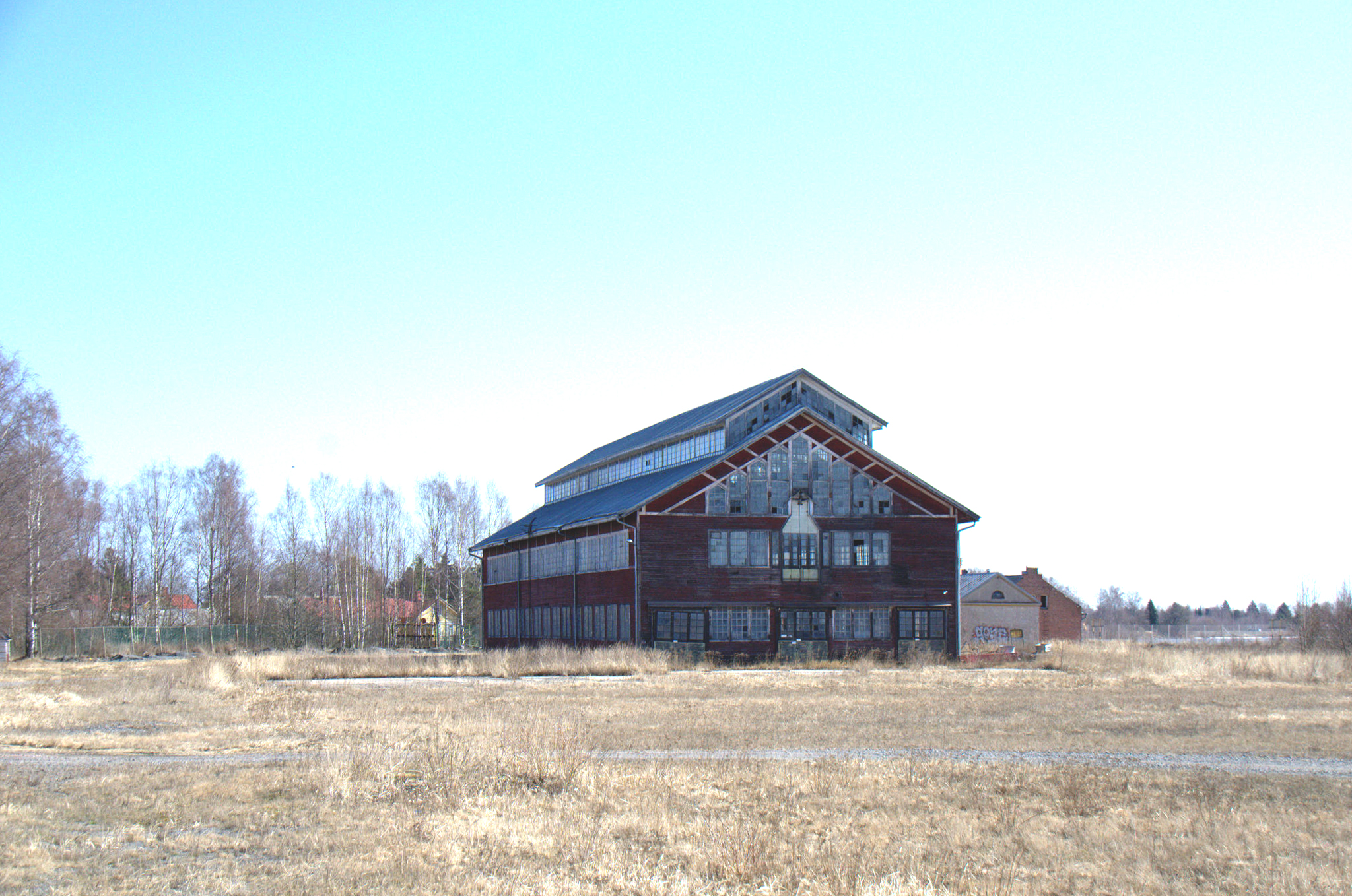 Isosannan saha